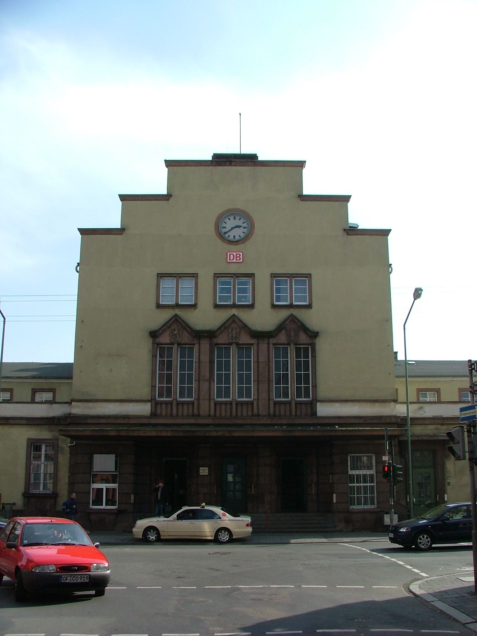 Hauptbahnhof Offenbach am Main This is a photograph of an architectural monument.It is on the list of cultural monuments of Offenbach am Main